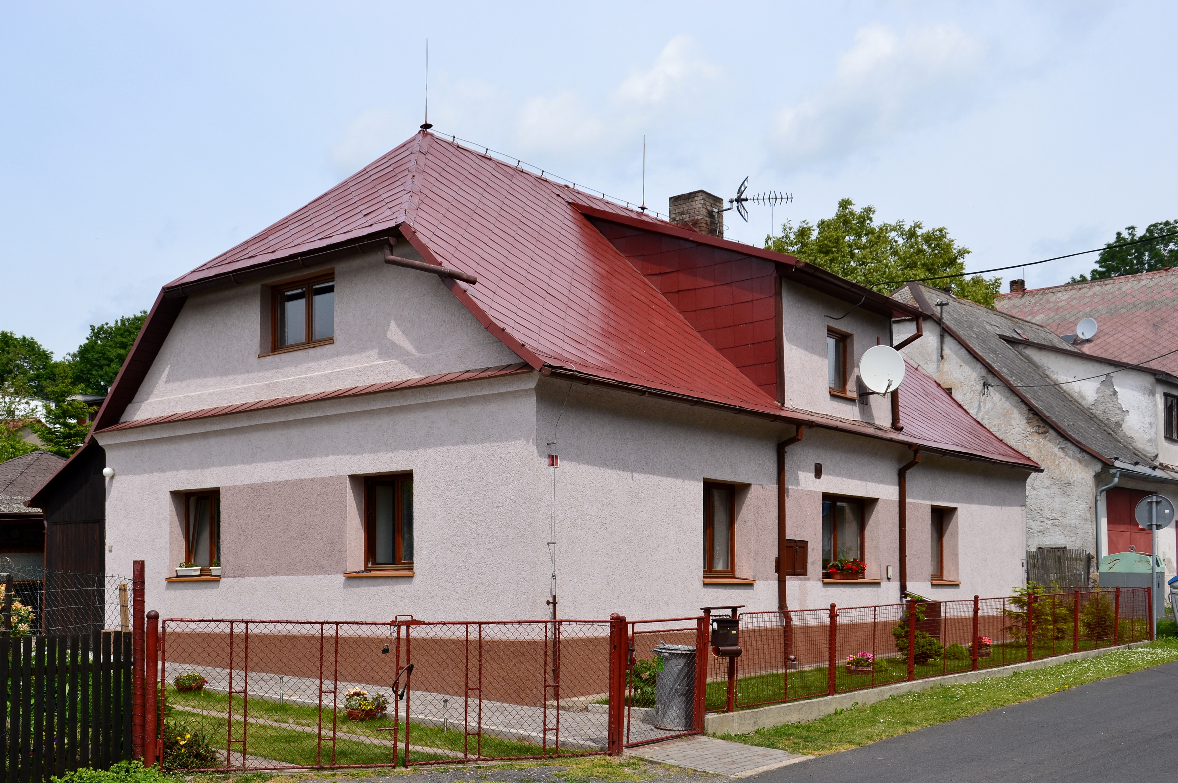 Usedlost čp. 1, Místo 1, Místo.